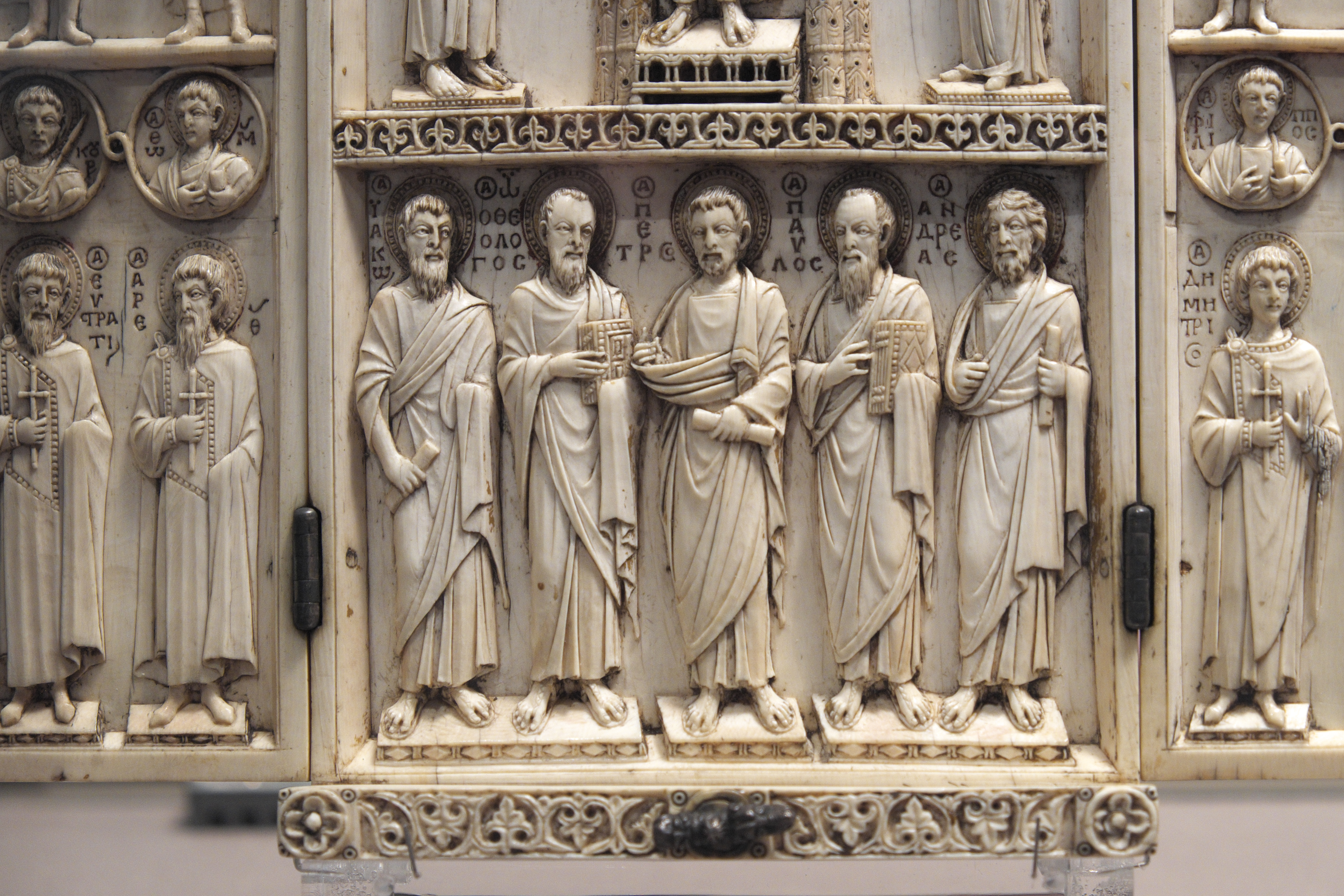 Harbaville-Triptychon im Musée du Louvre in Paris, aus der Mitte des 10. Jahrhunderts, Vorderseite (Ausschnitt), Darstellung: Apostel ( Triptyque Harbaville)